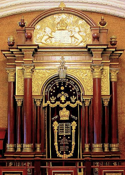 Синагога Бродского вул. Шота Руставели, 13 в Киеве